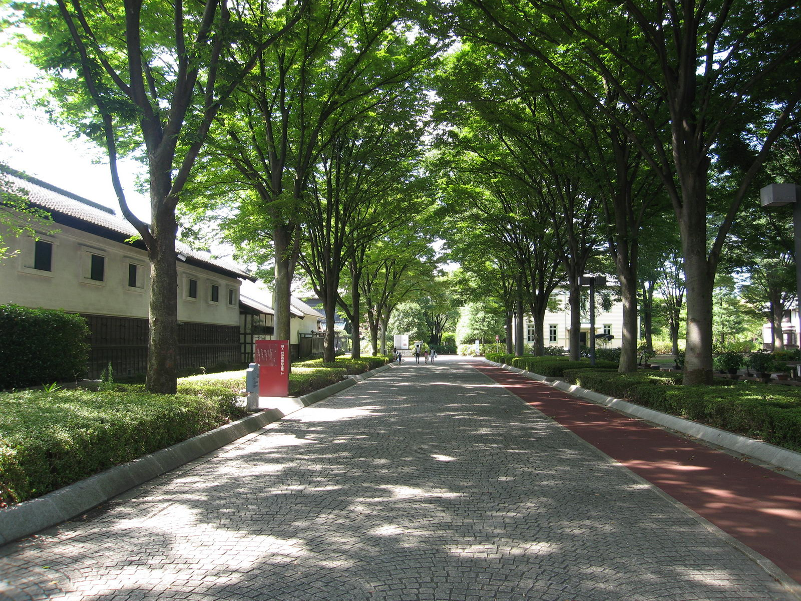 けやき通り（府中市郷土の森博物館）